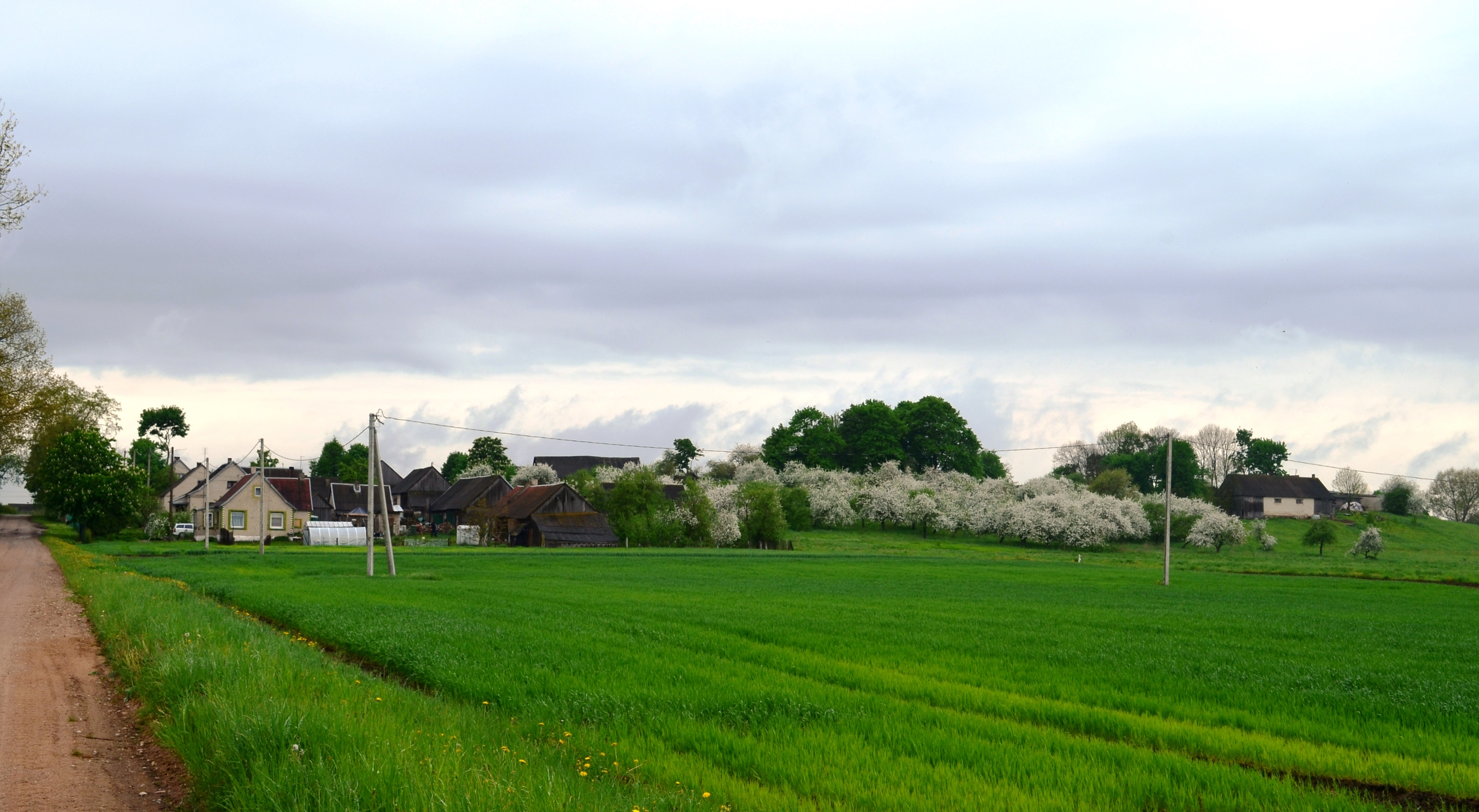 Jakšiai, Kėdainių raj.